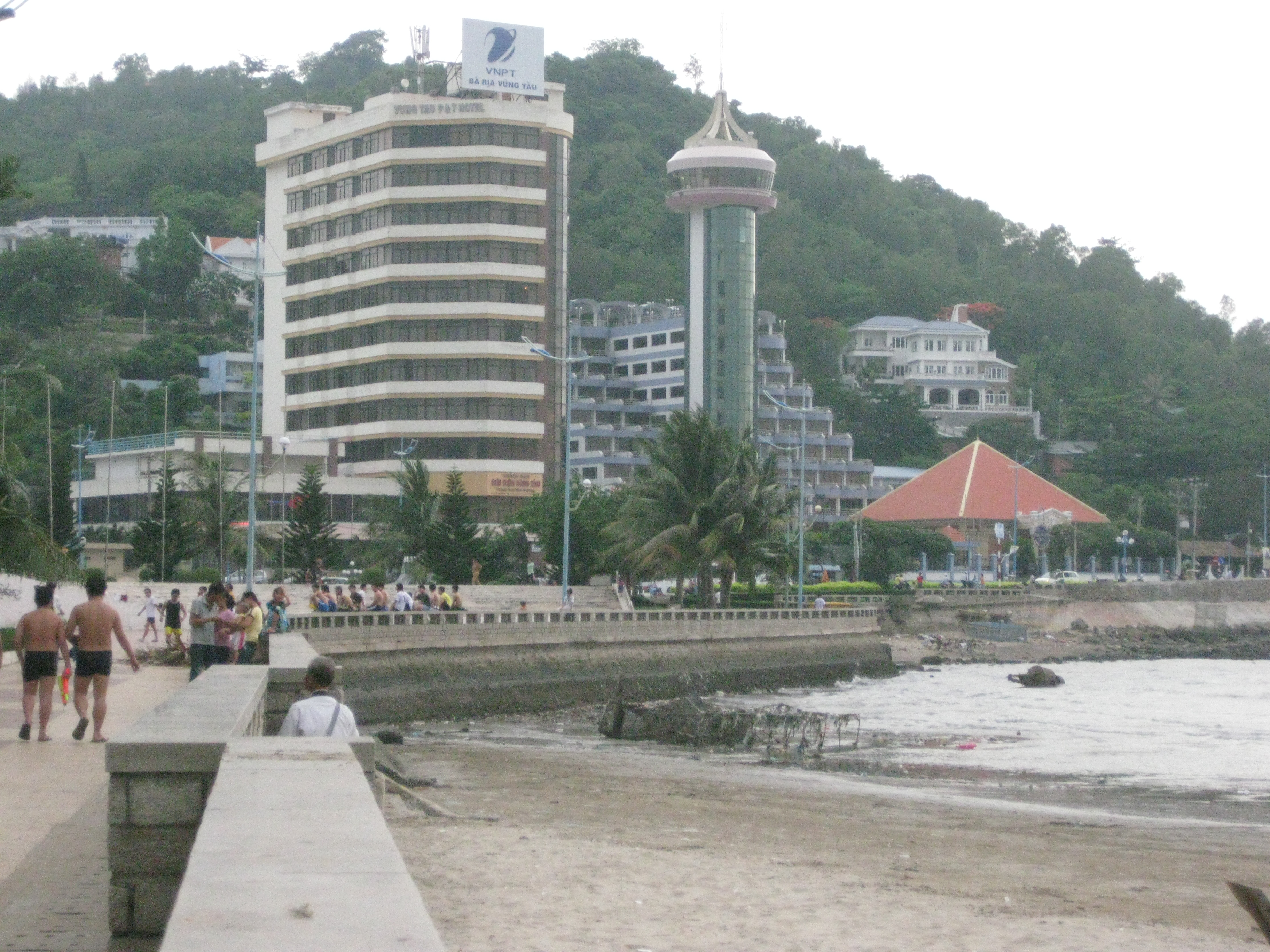 Bãi Trước